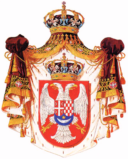 Grb Kraljevine SHS